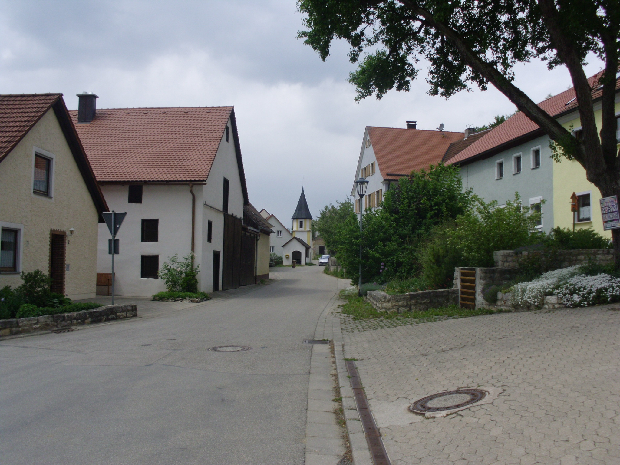 Falbenthal, Ortsteil der mittelfränkischen Stadt Treuchtlingen im Landkreis Weißenburg-Gunzenhausen (Bayern)